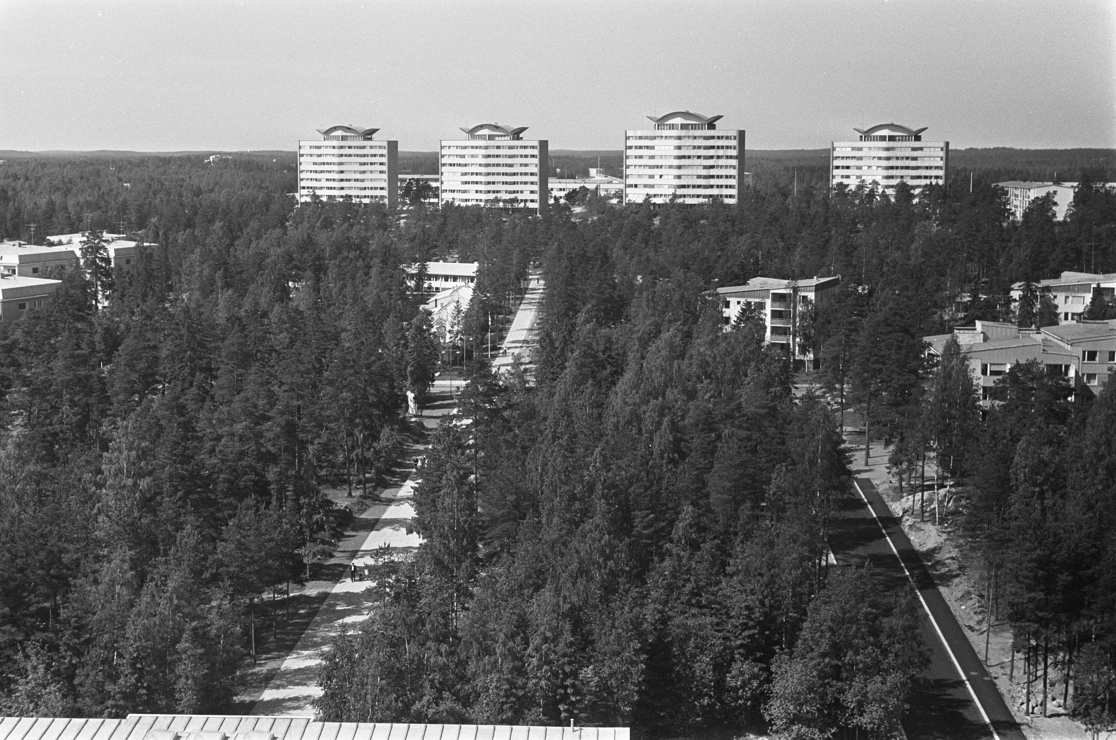 Collectie / Archief : Fotocollectie Anefo Reportage / Serie : Finland Beschrijving : Moderne architectuur in Helsinki Datum : 5 juli 1967 Locatie : Finland, Helsinki Trefwoorden : architectuur, gebouwen, woningbouw Fotograaf : Fotograaf Onbekend / Anefo Auteursrechthebbende : Nationaal Archief Materiaalsoort : Negatief (zwart/wit) Nummer archiefinventaris : bekijk toegang 2.24.01.05 Bestanddeelnummer : 920-4662